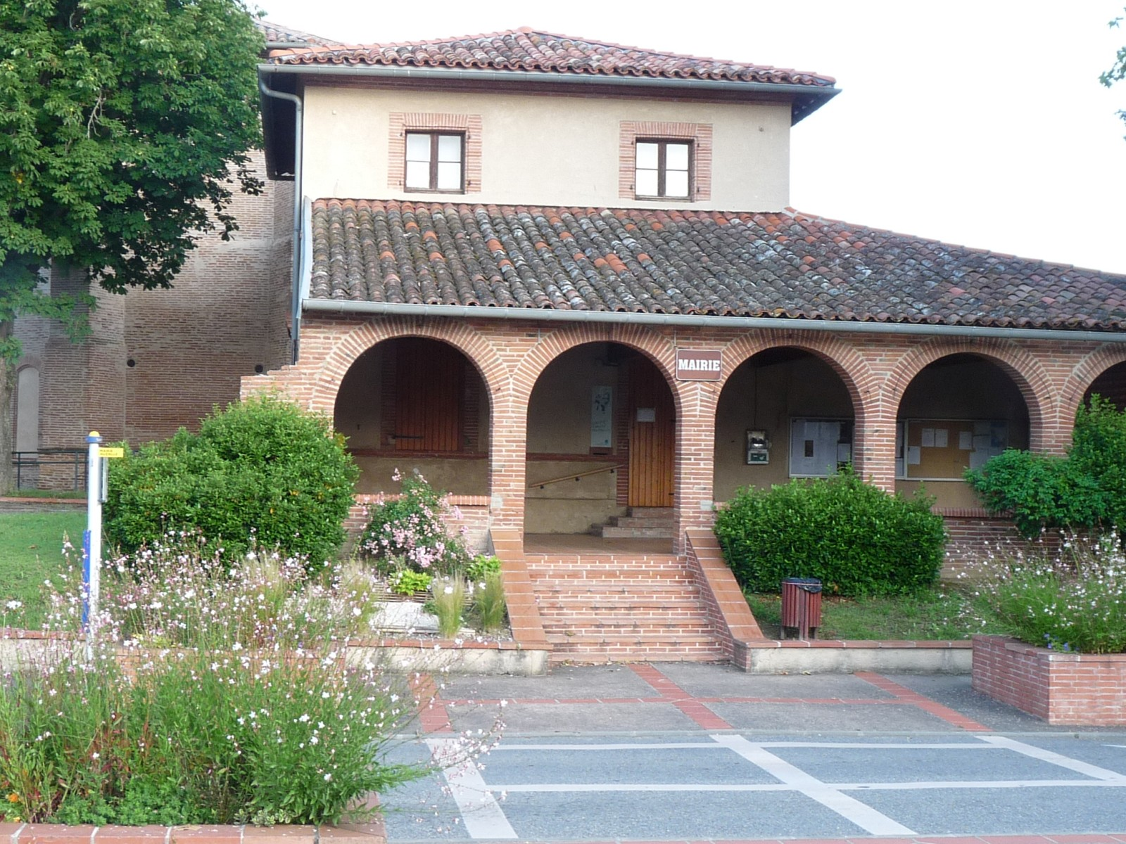 Mairie d'Auzielle, Haute-Garonne, France